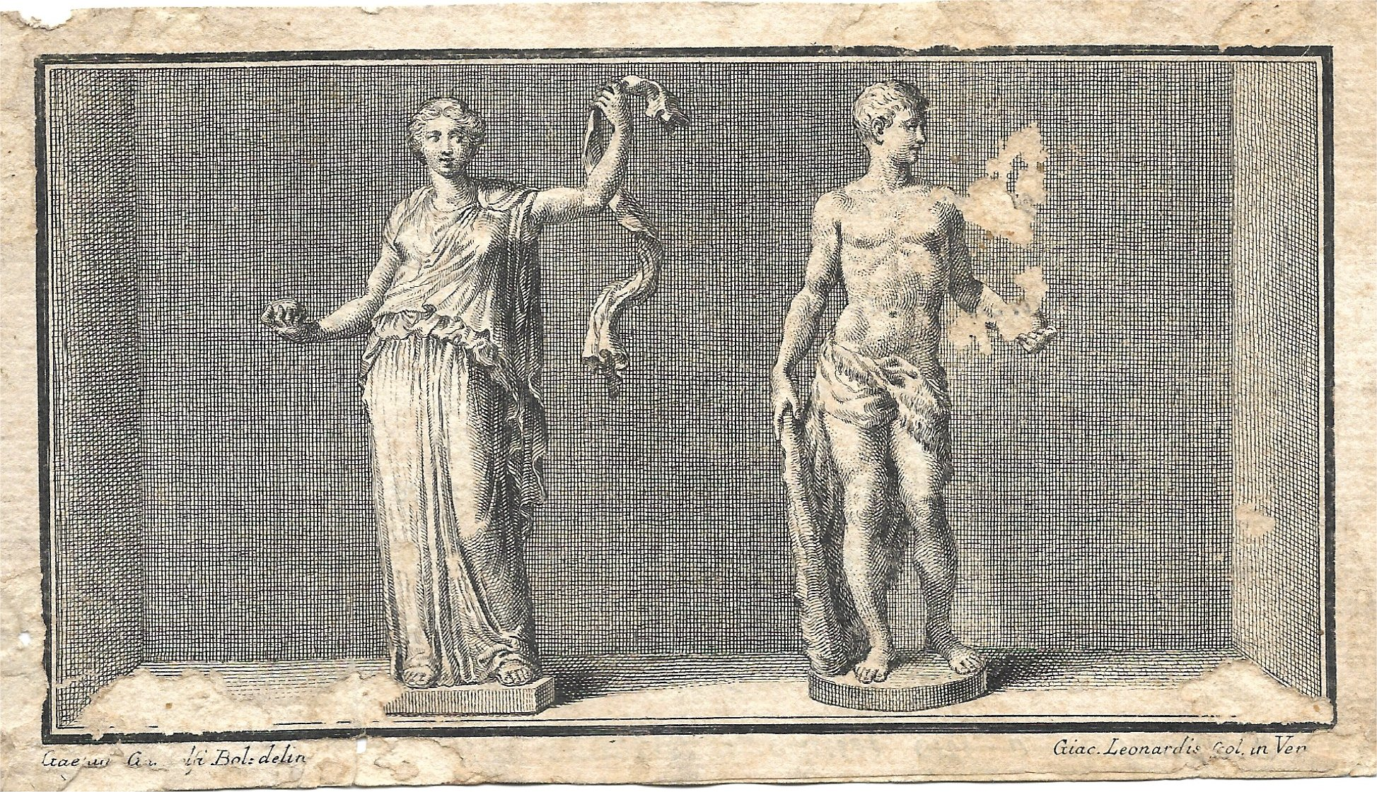 Incisione di Giacomo Leonardis, su disegno di Gaetano Gandolfi, raffigurante Giunone (?) e Ercole